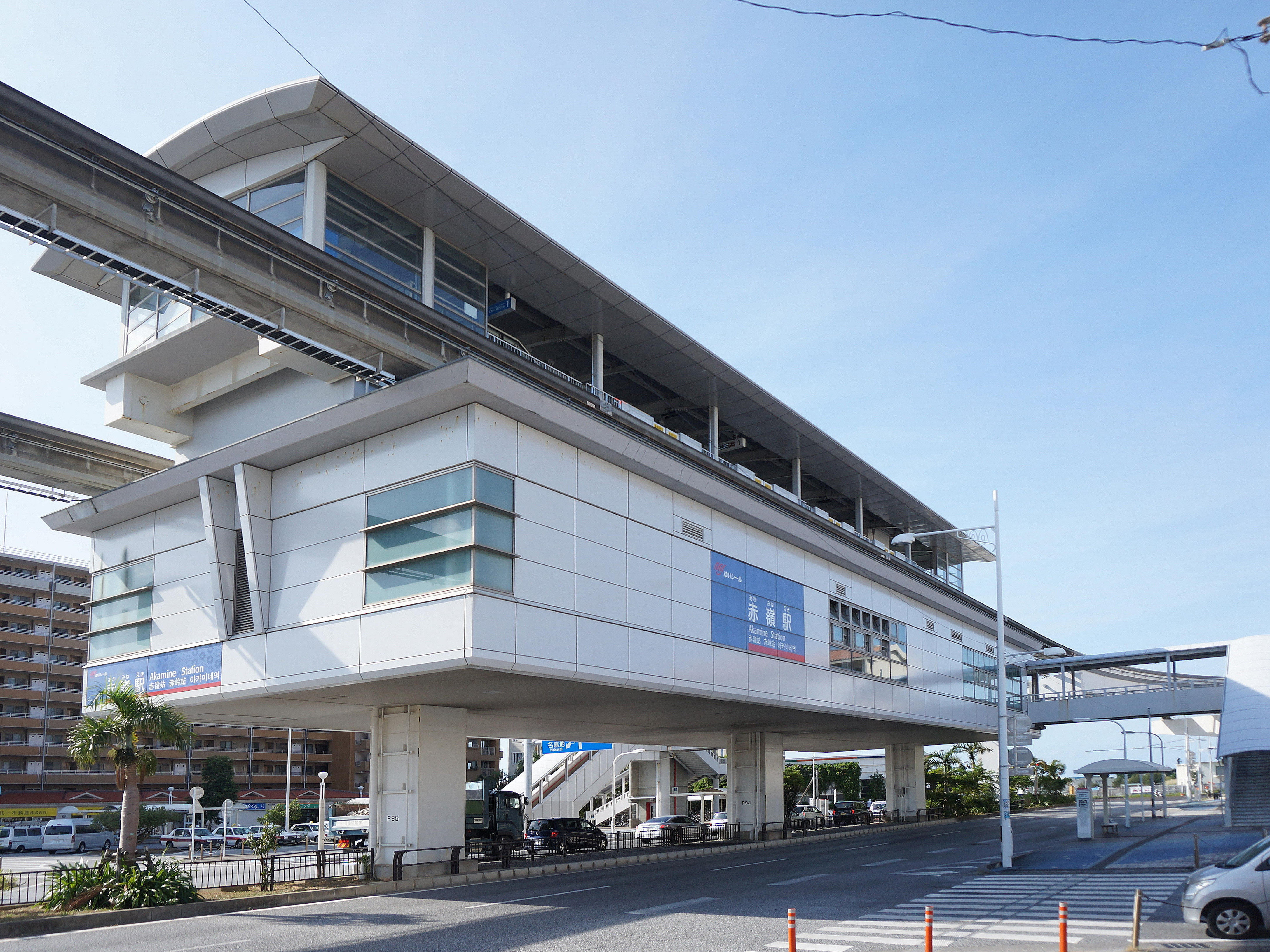 沖繩都市單軌電車線赤嶺站。